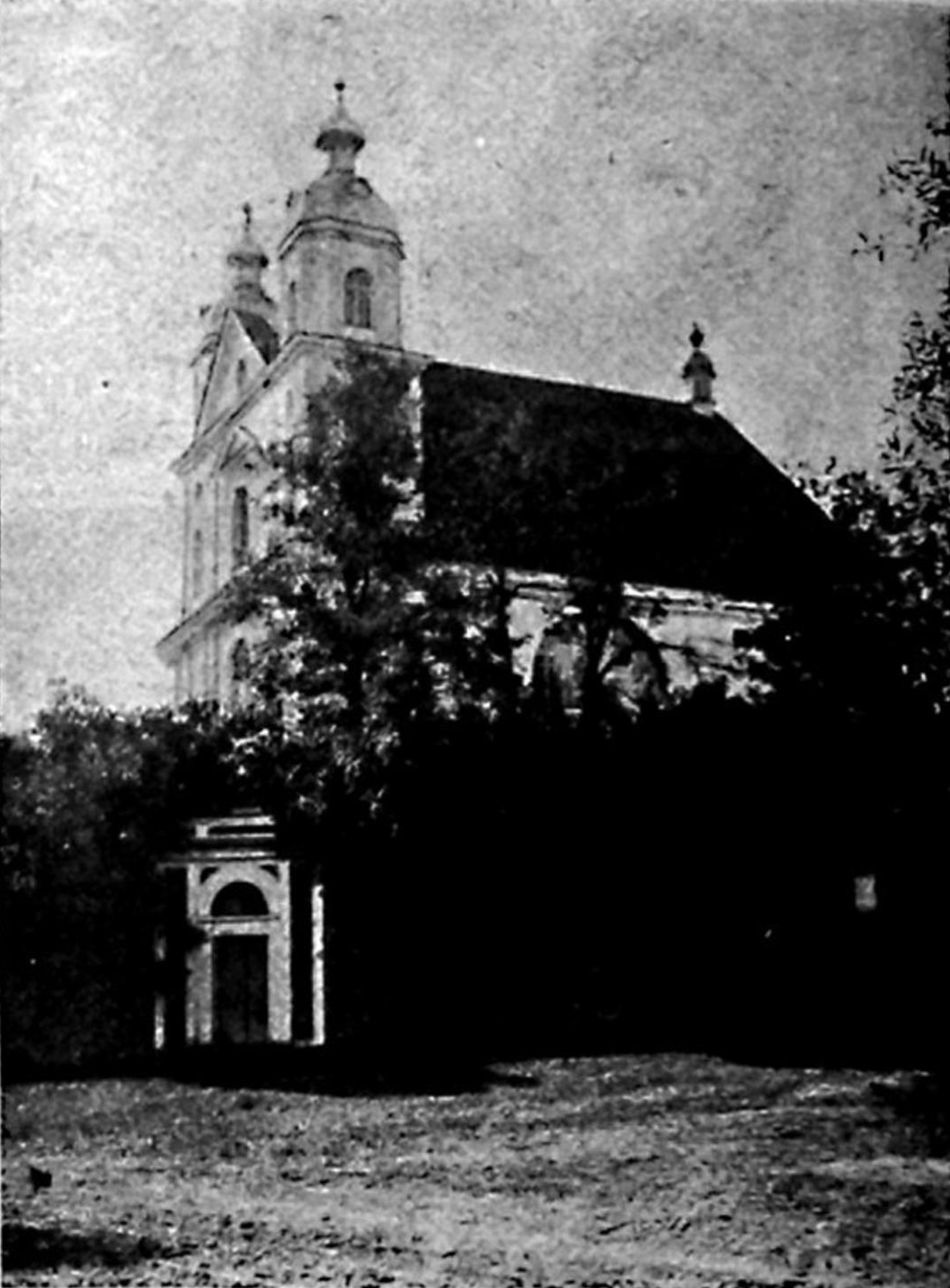 Беларуская (тарашкевіца): Вільня (Vilnia), Трынапаль (Trynapal). Касьцёл Найсьвяцейшай Тройцы і кляштар трынітарыяў па маскоўскай перабудове